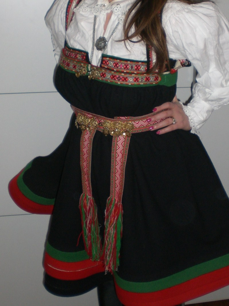 Kvinnebunad fra Valle i Setesdal